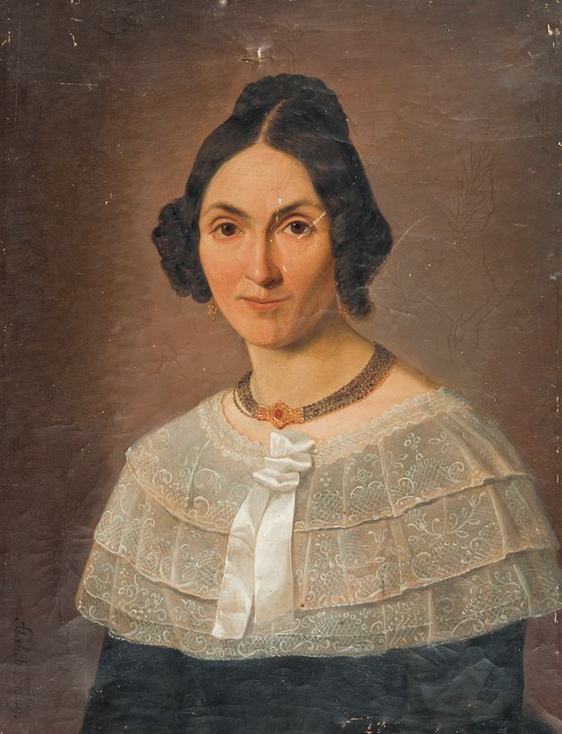 Louise Müller geb. Bonichon, im Alter von 39 Jahren. In schwarzem Kleid mit breitem Spitzenkragen und Granathalskette.